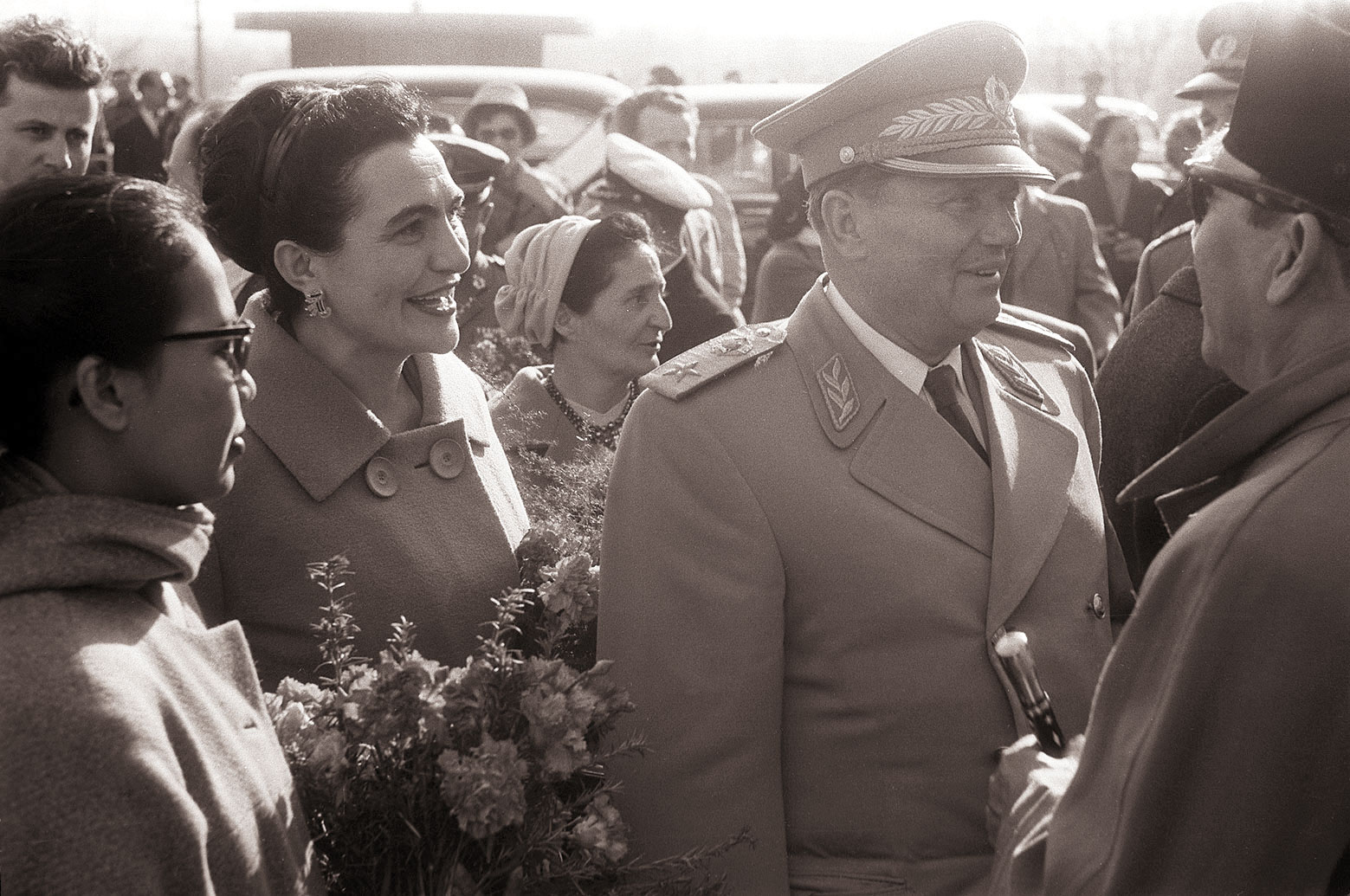 Predsednik Tito in Sukarno s soprogama pred Postojnsko jamo.